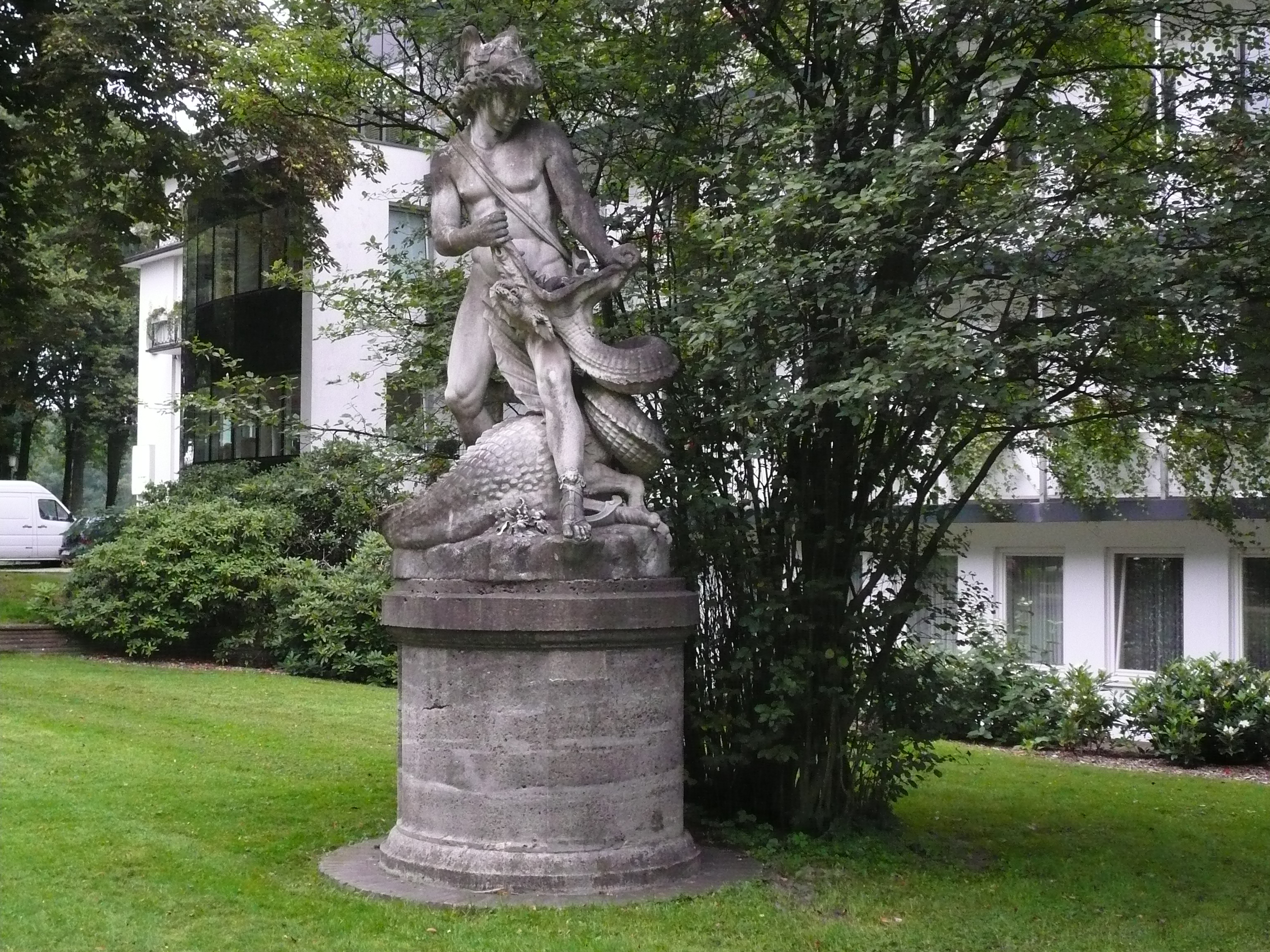 Die Skulptur „Siegfried, der Drachentöter“ von Constantin Dausch in Bremen Das abgebildete Objekt ist ein geschütztes Kulturdenkmal in der Freien Hansestadt Bremen, mit der Nr. 0218,T027 beim Landesamt für Denkmalpflege registriert.